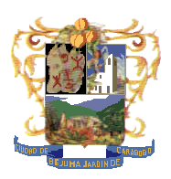 Escudo del municipio Bejuma, estado Carabobo, Venezuela